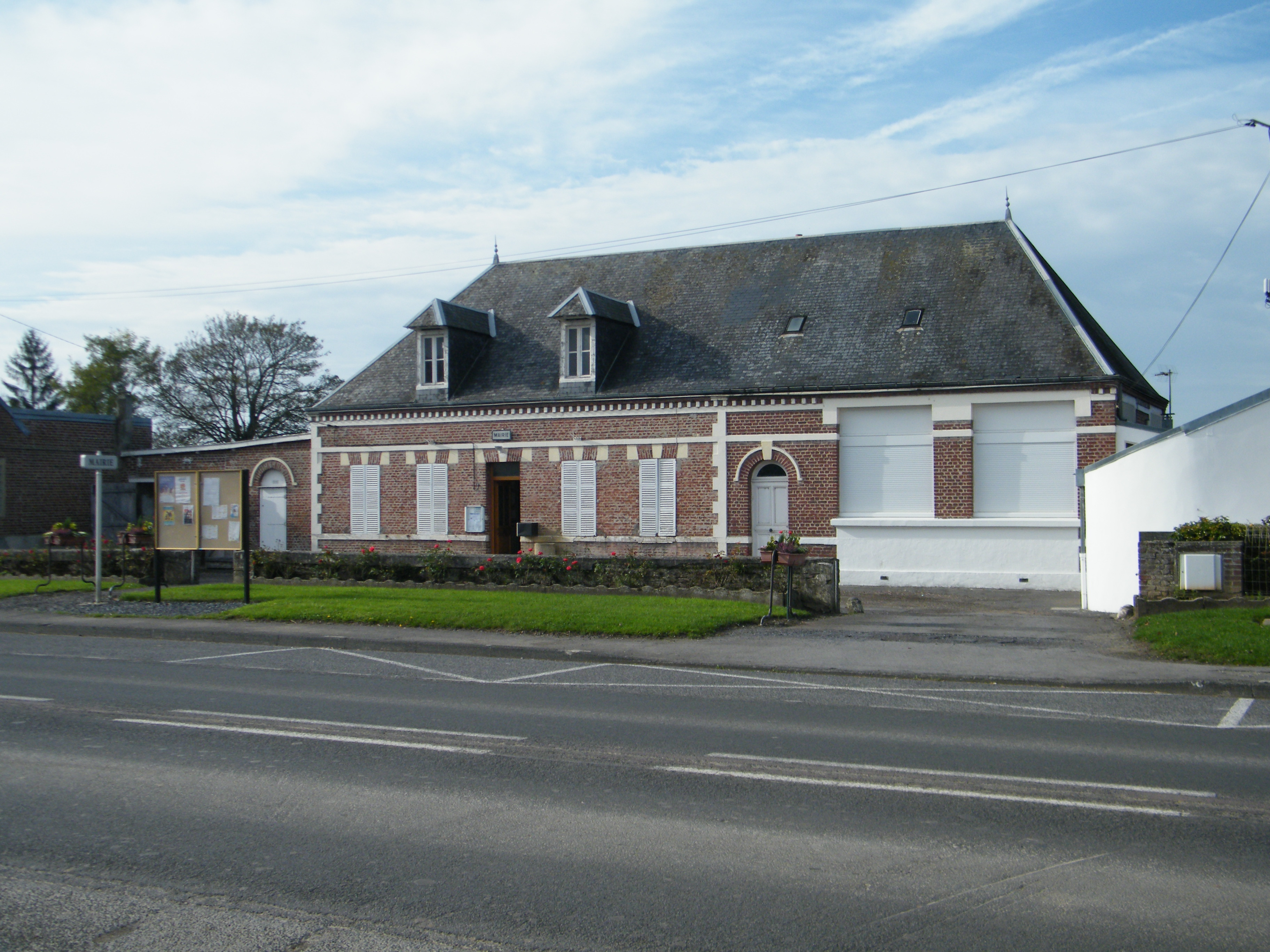 Mairie.